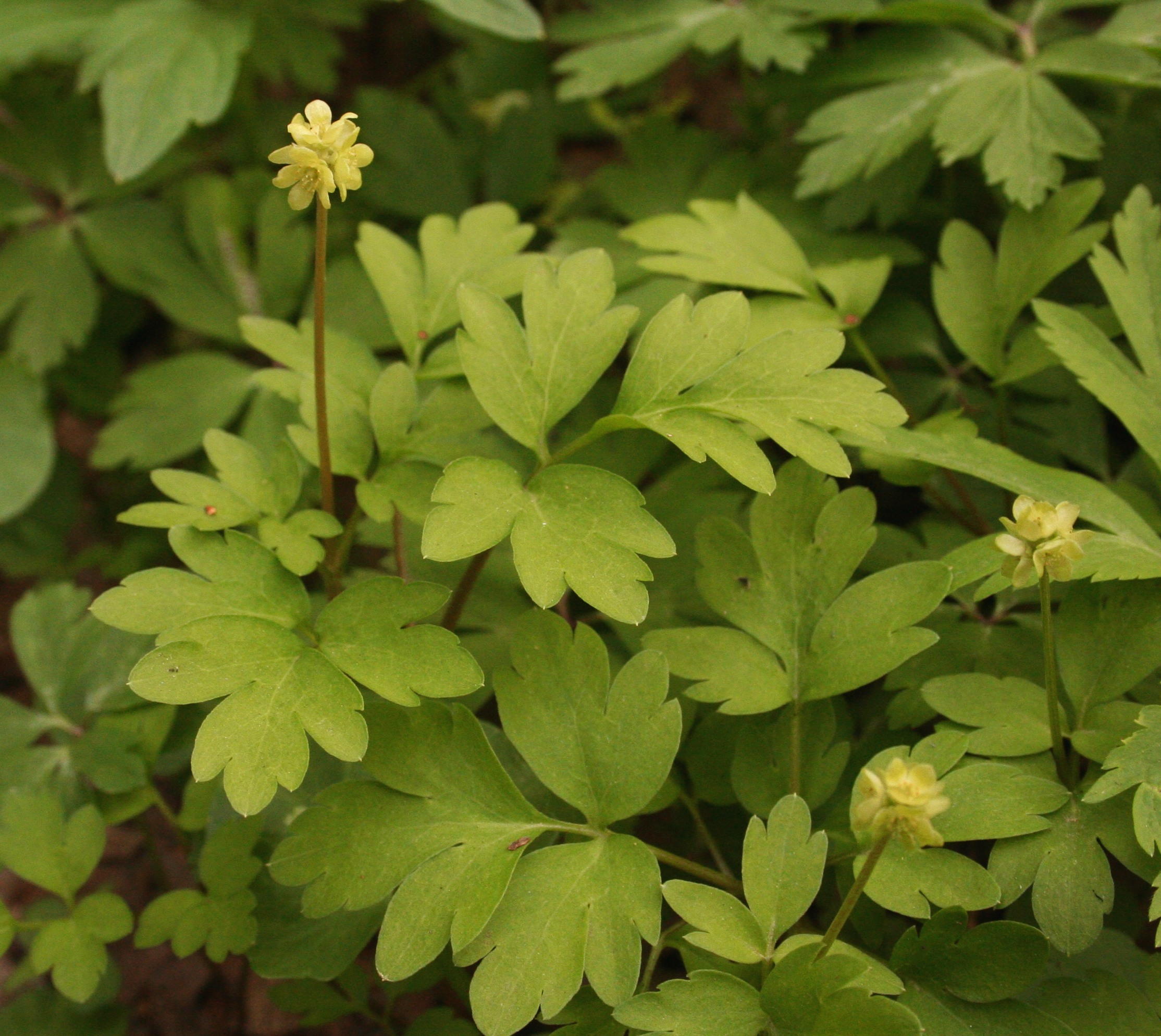 Adoxa moschatellina - piżmaczek wiosenny